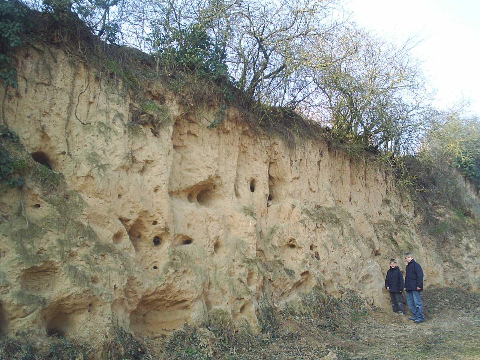 Wörschberger Hohl mit Lösswand bei Dirmstein